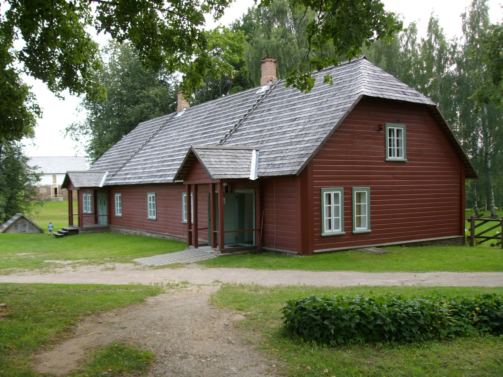 Karilatsi koolimaja, hilisem talurahvamuuseumi hoone